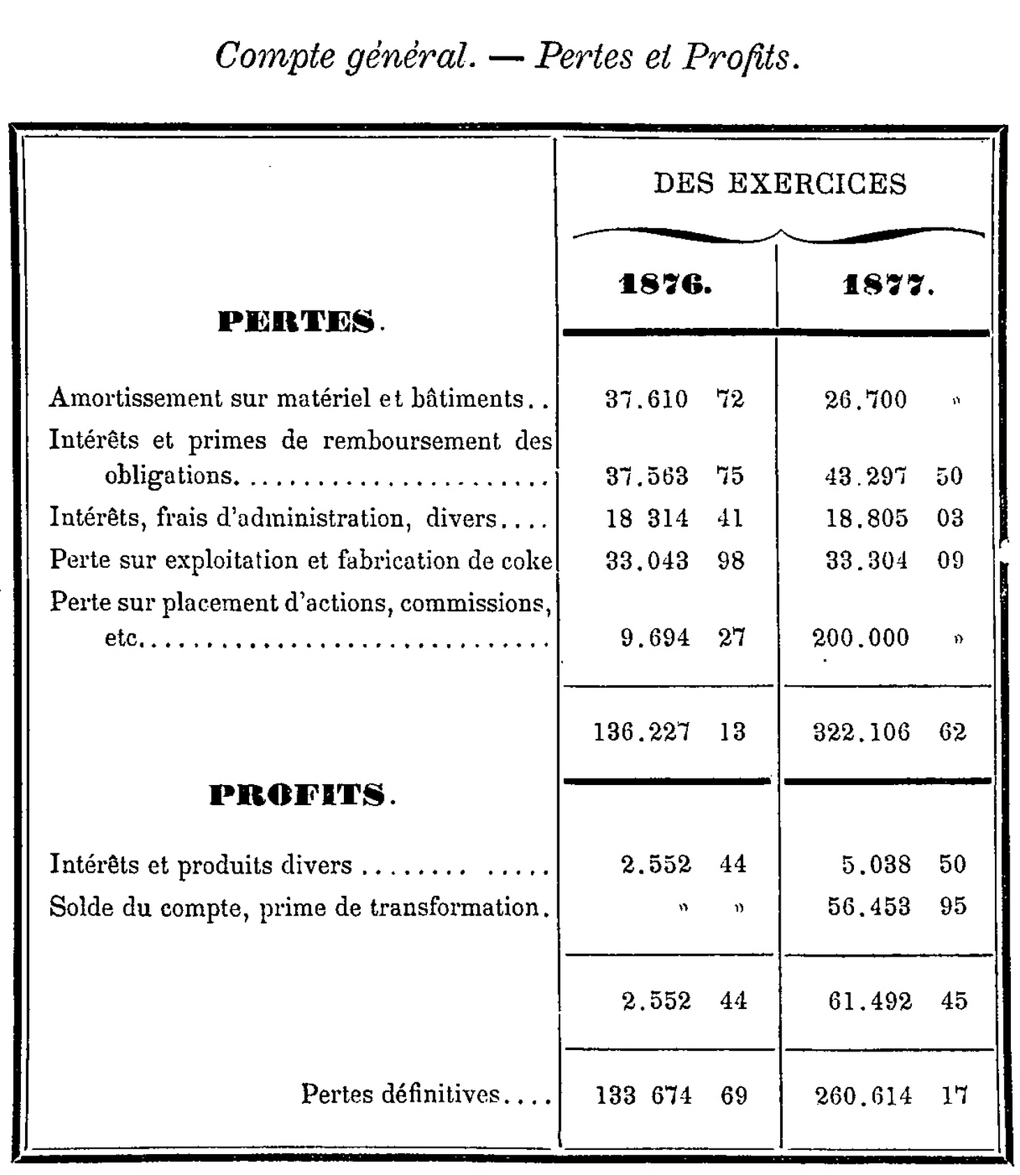 Pertes et profits en 1876 et 1877 de la Compagnie des mines de la Lys-Supérieure.